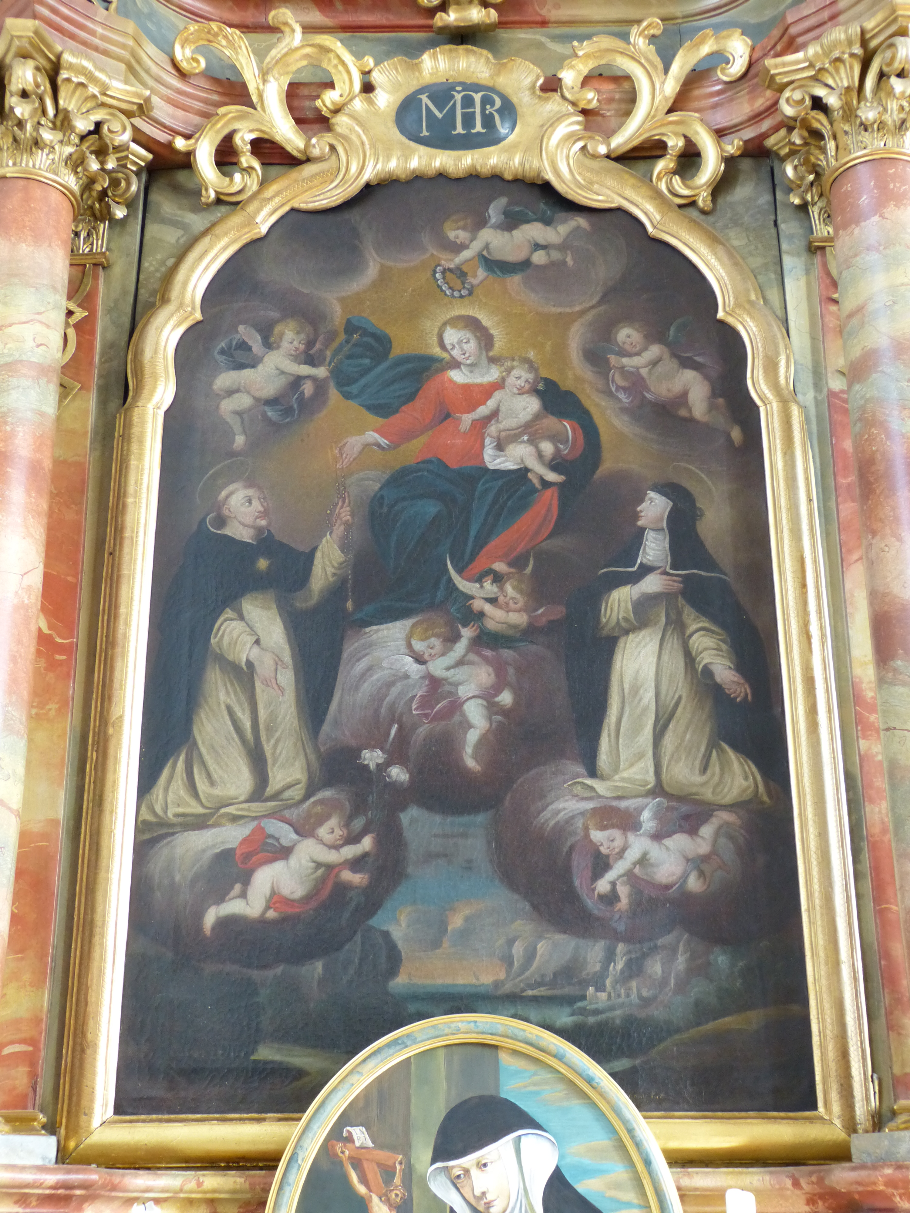 St. Stephan, Hawangen, Landkreis Unterallgäu, Bayern